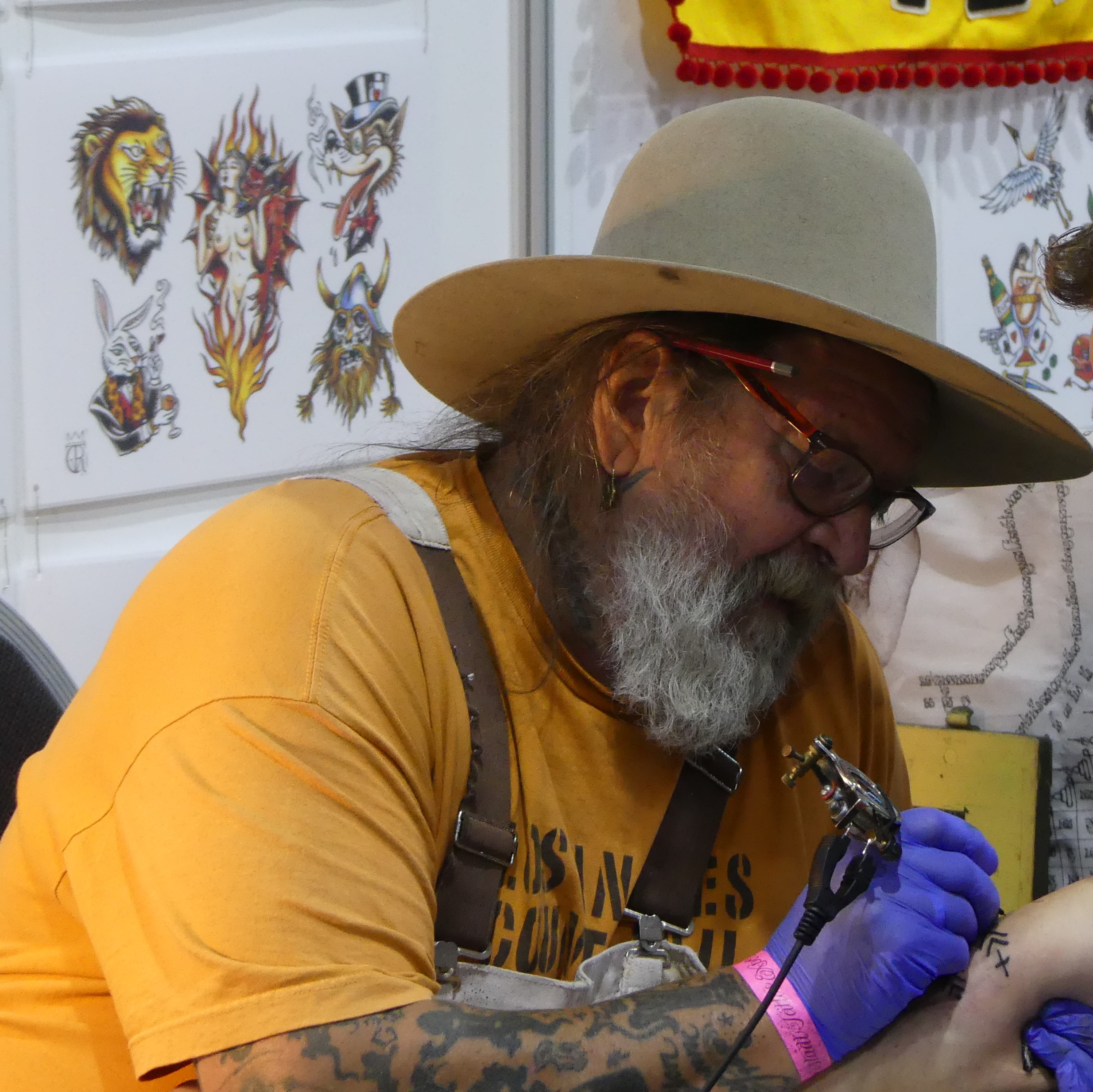 Henk Schiffmacher auf der Kaiserstadt Tattoo Expo 2018